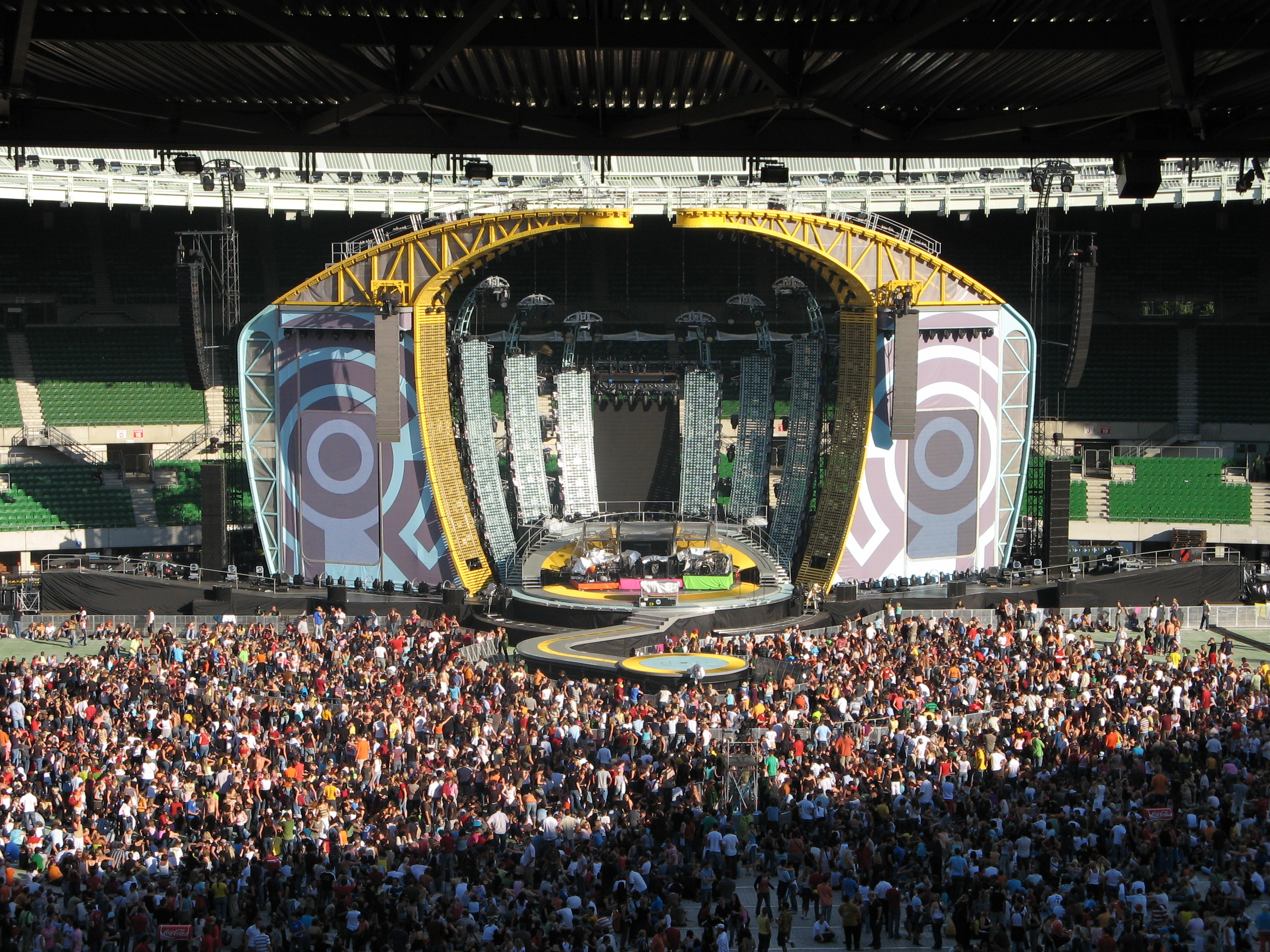 Vista del escenario de la gira Close Encounters Tour (2006), de Robbie Williams, durante su recital en Viena, Austria.